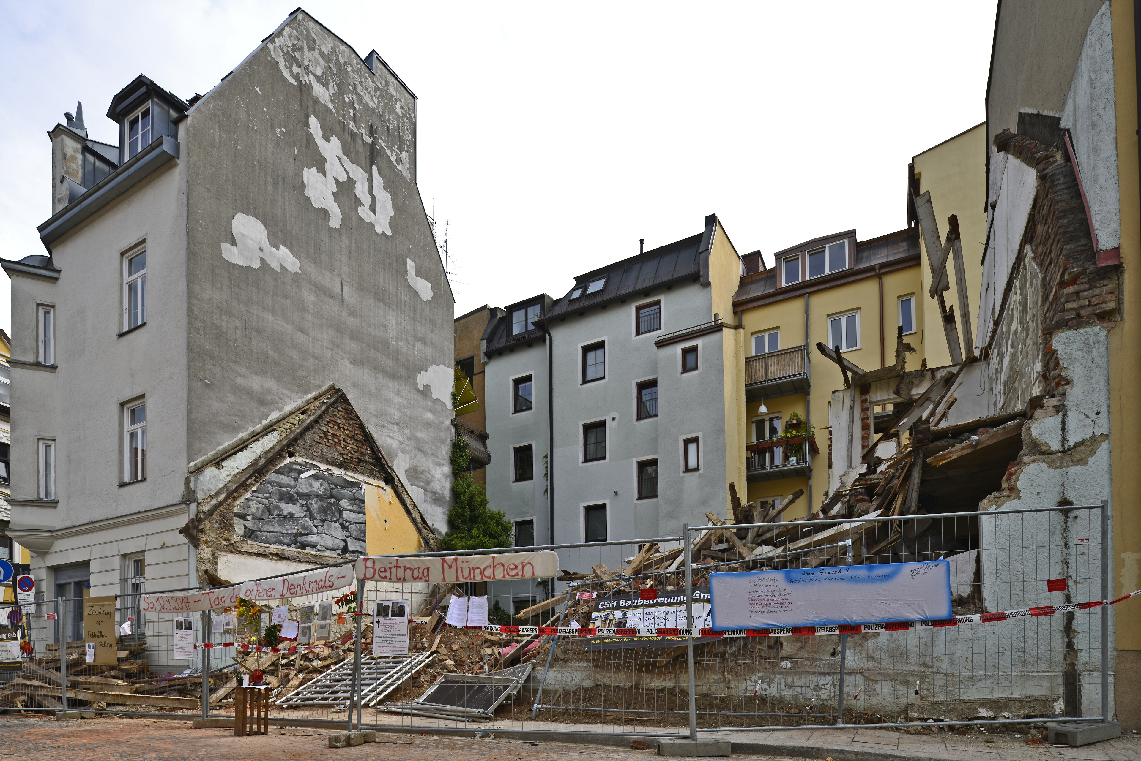 München, Giesing. Obere Grasstraße 1. Zustand nach dem Abbruch.